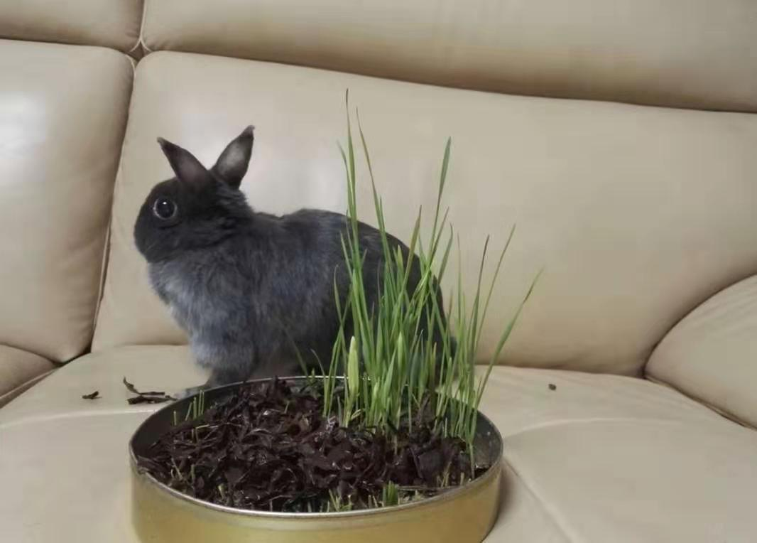 my rabbit